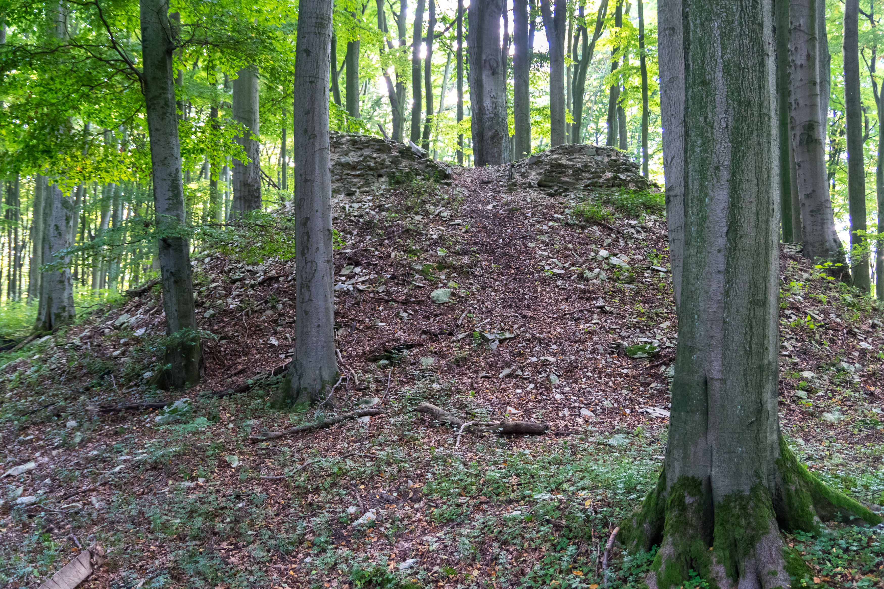 Ruine der Kirche Kerkberg, Bau- und Bodendenkmal in Büren (Westfalen)